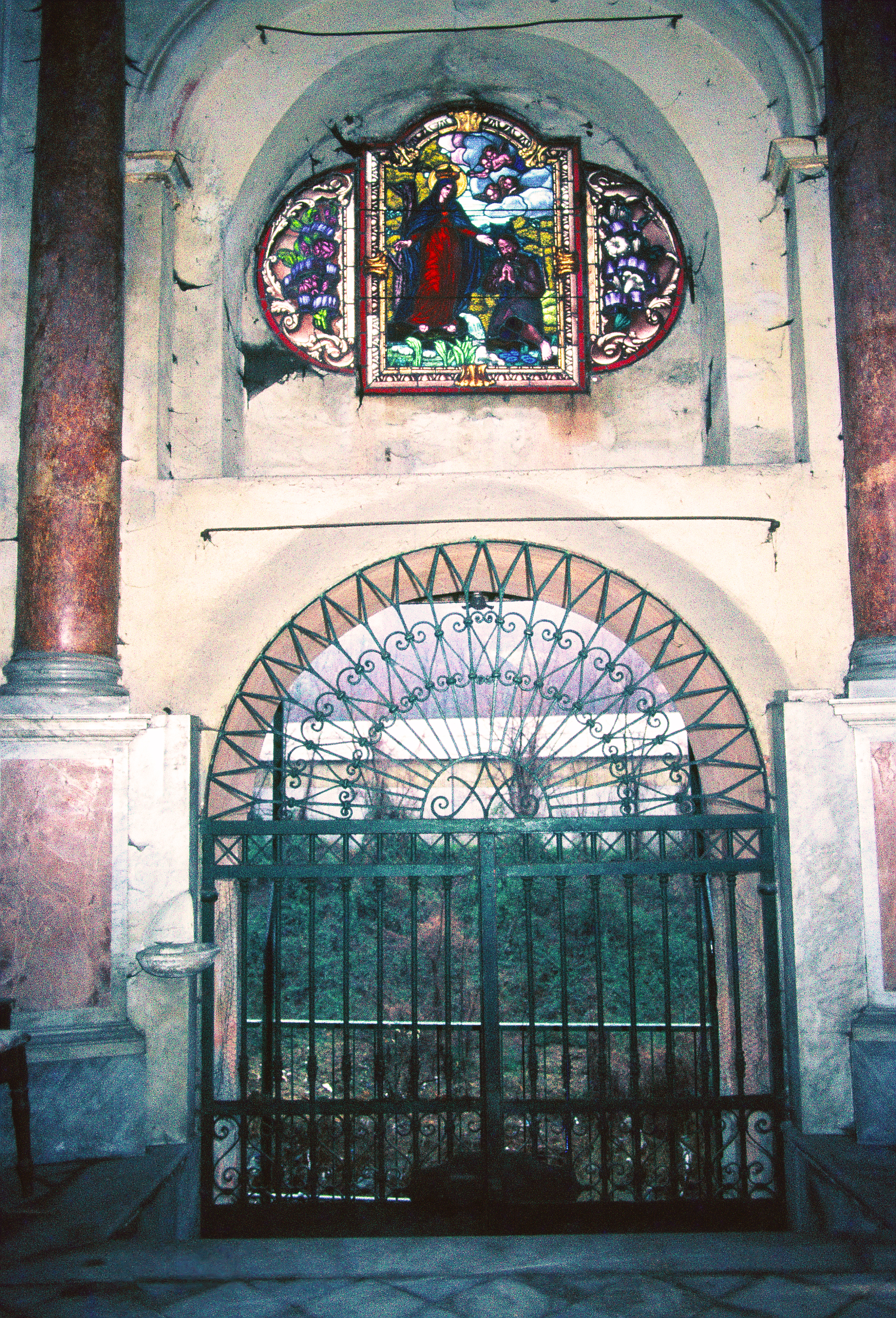 1983, il cancello lati interno prima del restauro